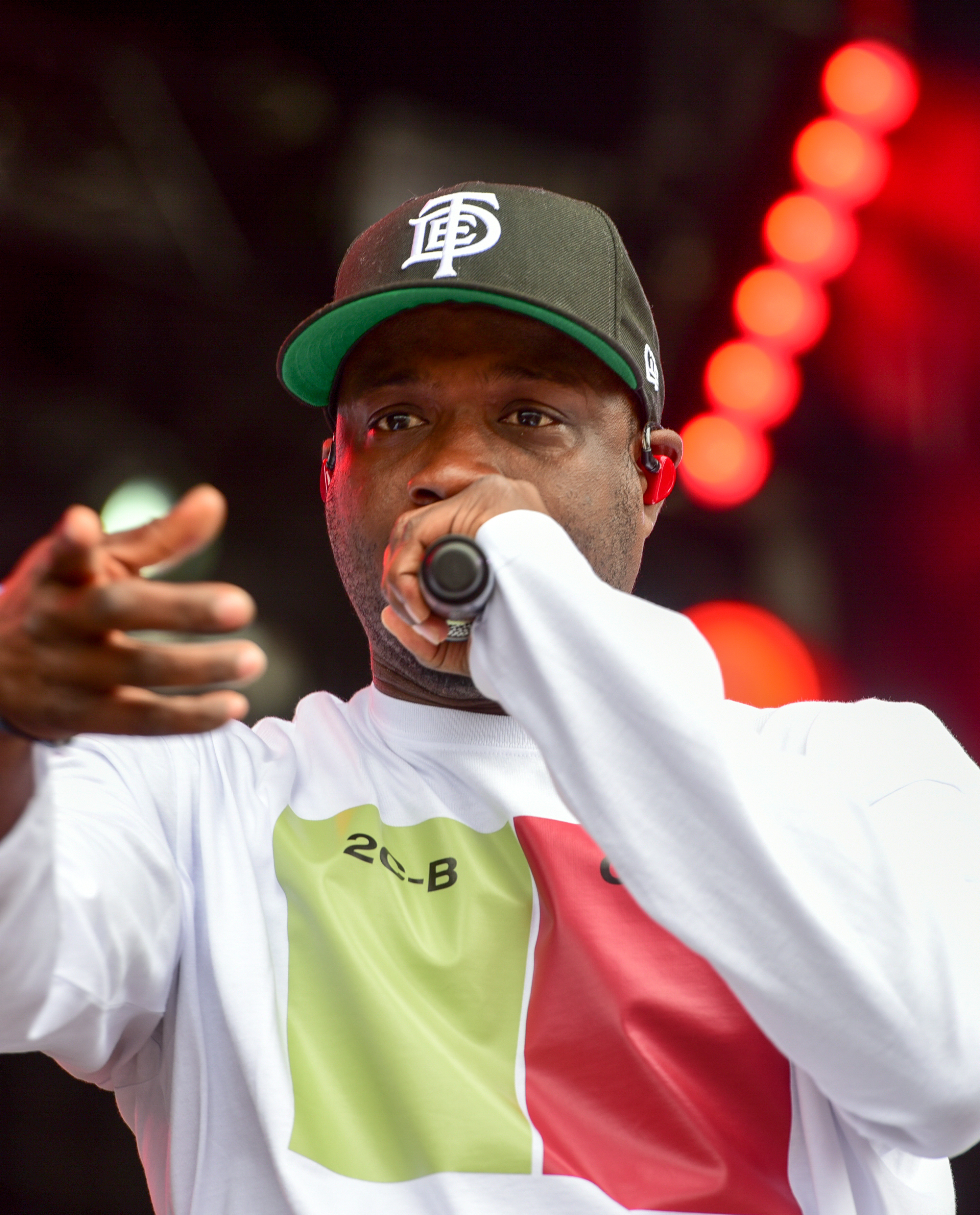 Jay Rock live auf dem Openair Frauenfeld 2019